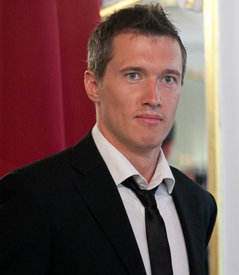 Juris Štāls